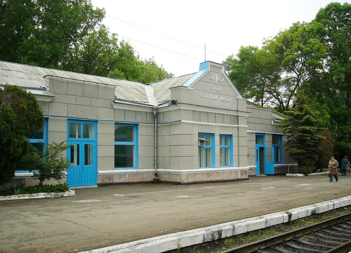 Вид со стороны путей